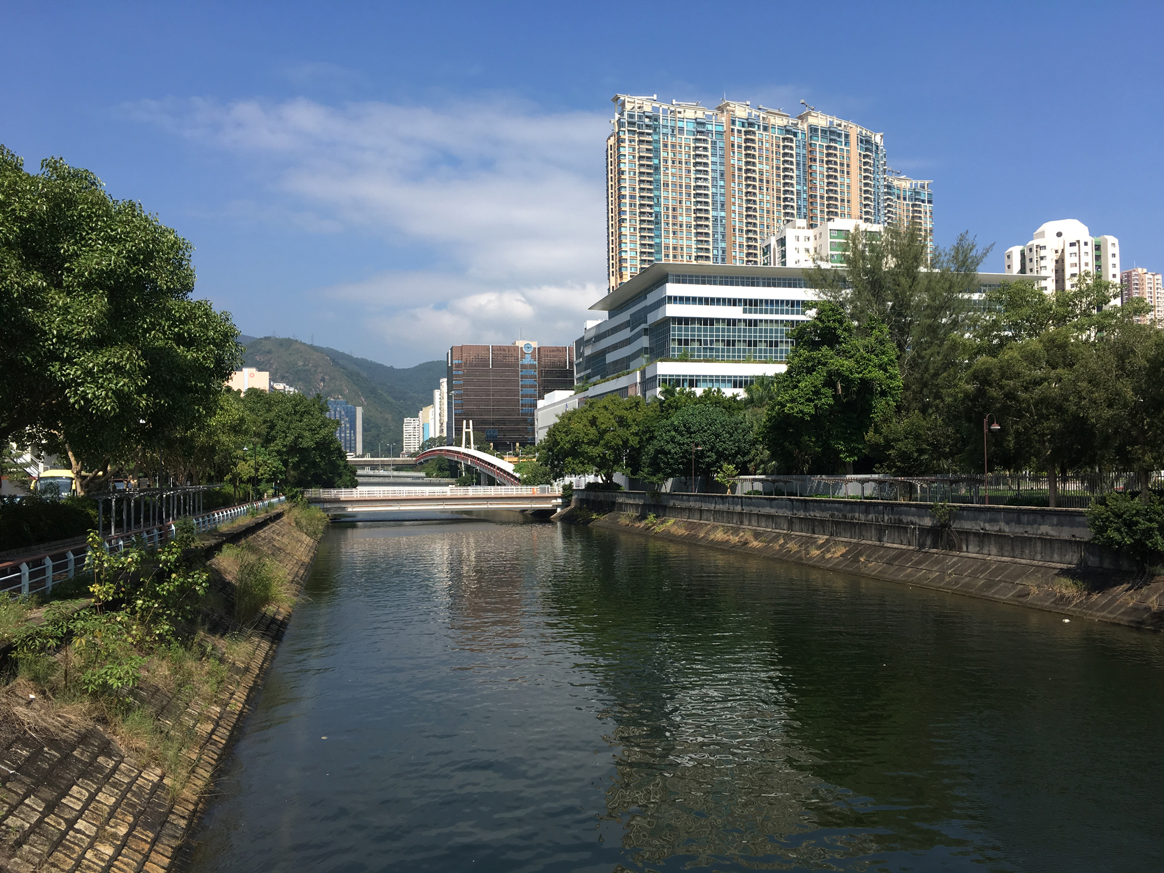 Fo Tan Nullah